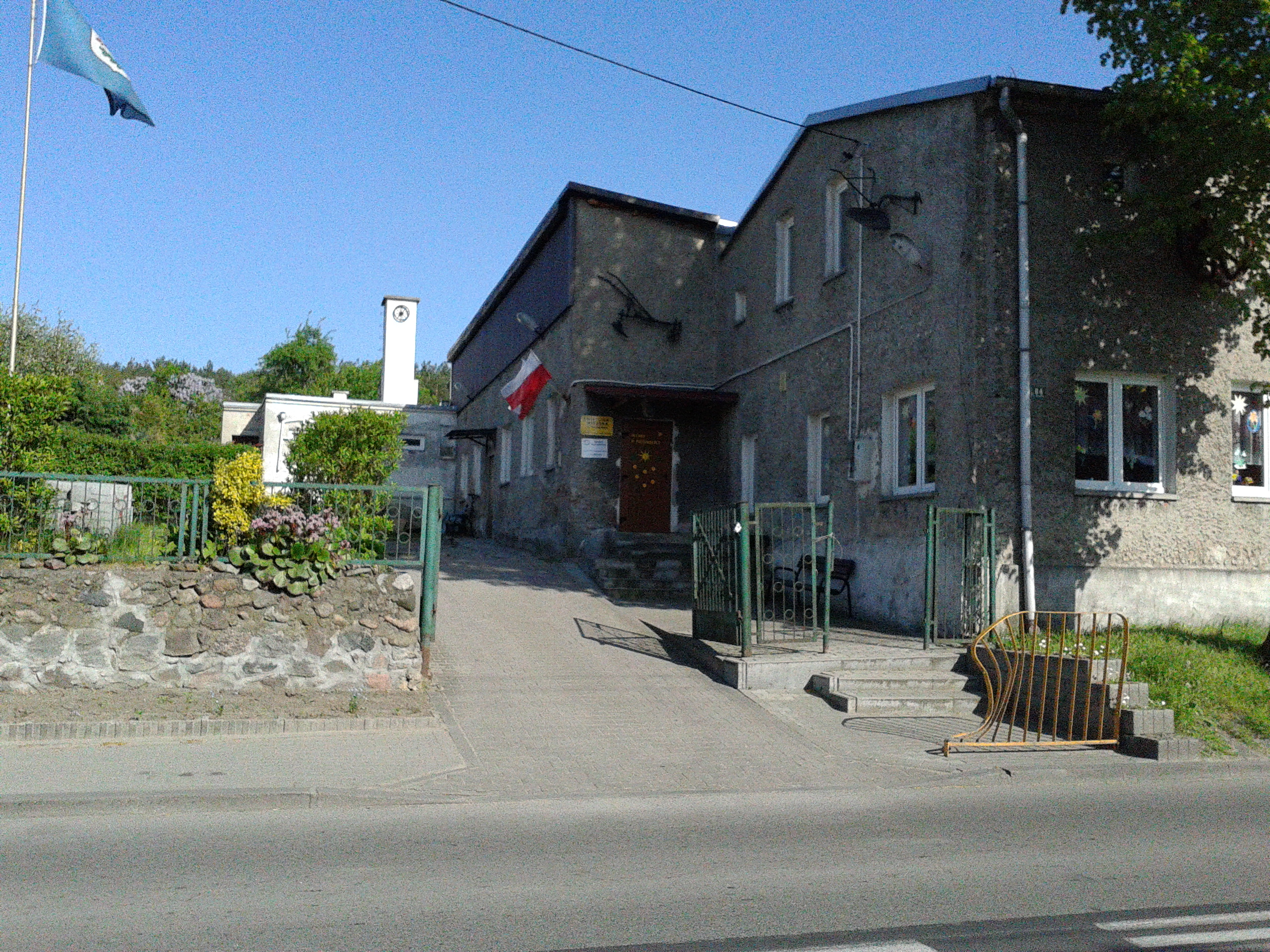 Ośrodek kultury.